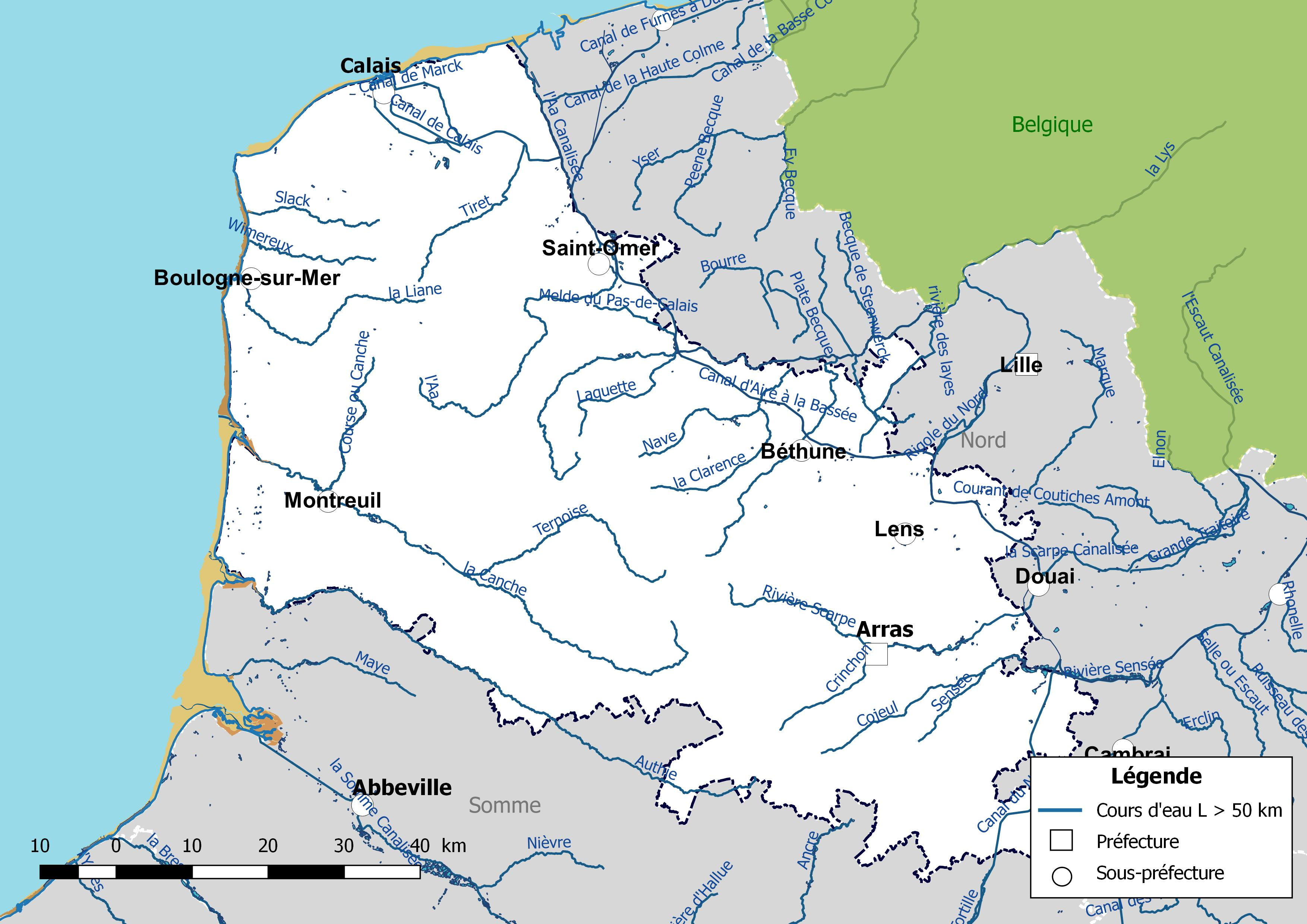 Carte des cours d'eau de longueur supérieure à 50 km drainant le département du Pas-de-Calais (France).